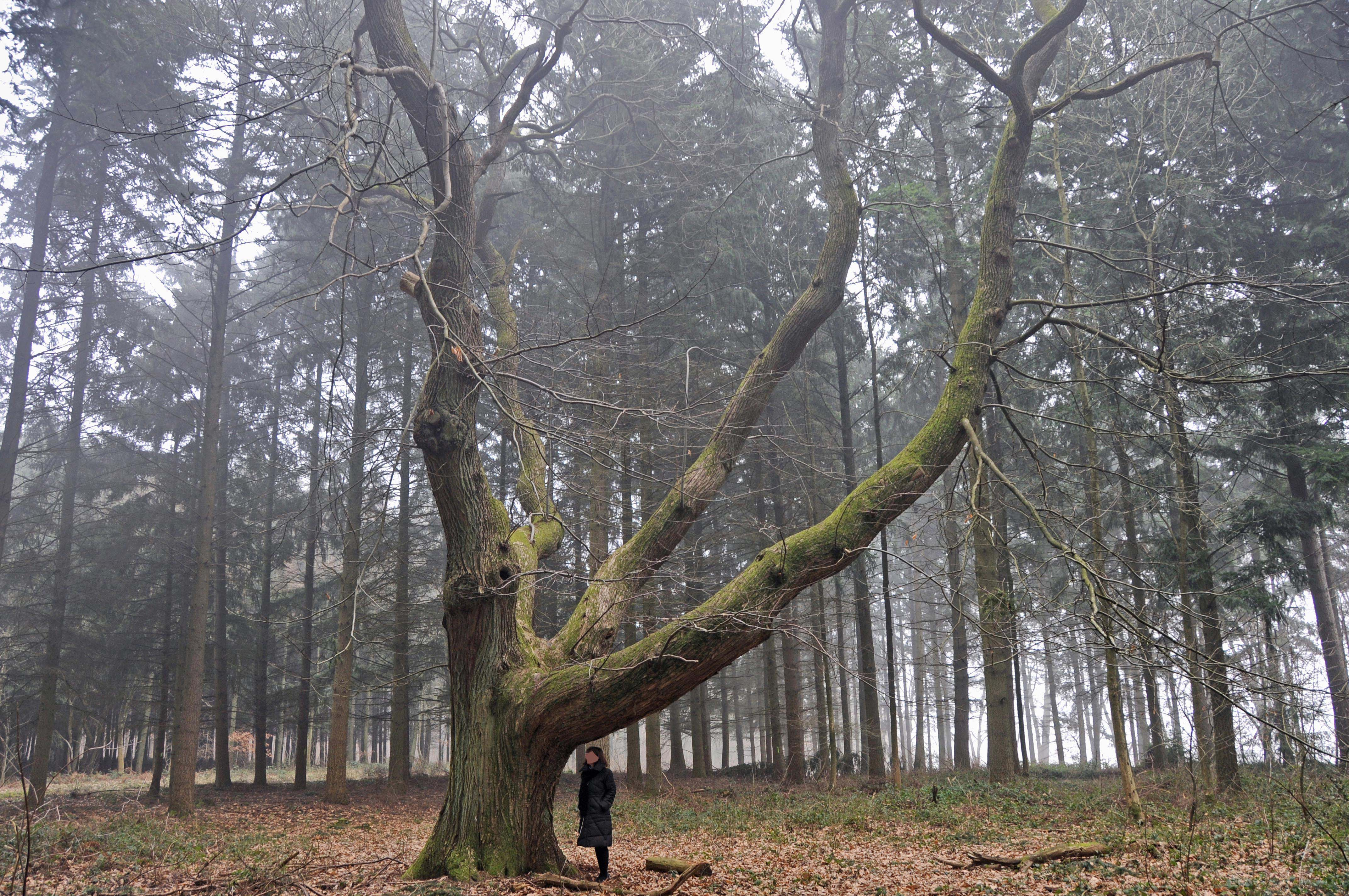 Séisskäschtebam um Scheedhaff.